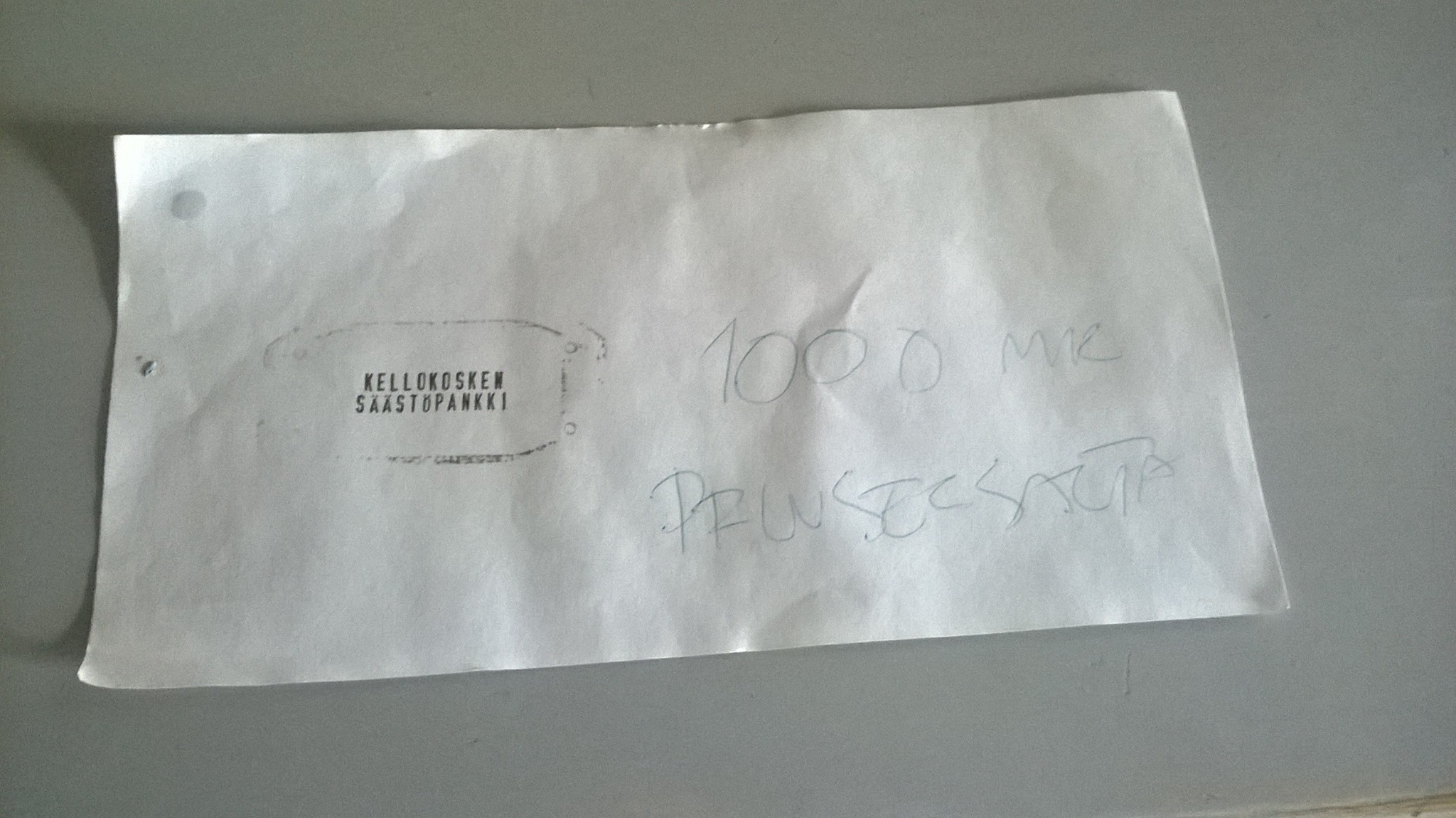 Anna Lappalaisen (Kellokosken prinsessa) kirjoittama valeshekki jossa Kellokosen pankin leima